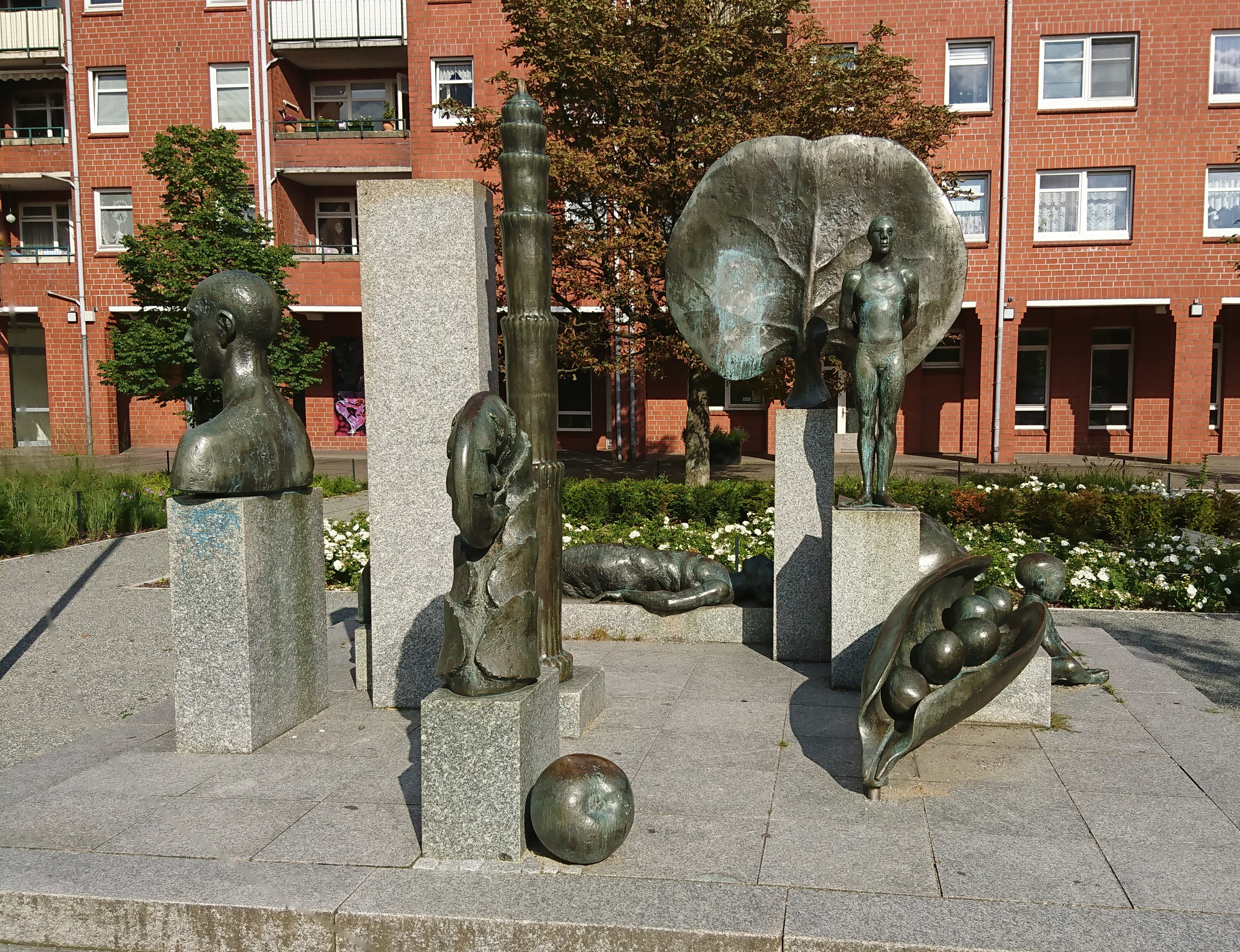 Skulpturengruppe auf dem Käkenhof in Hamburg-Langenhorn von Doris Waschk-Balz von 1985